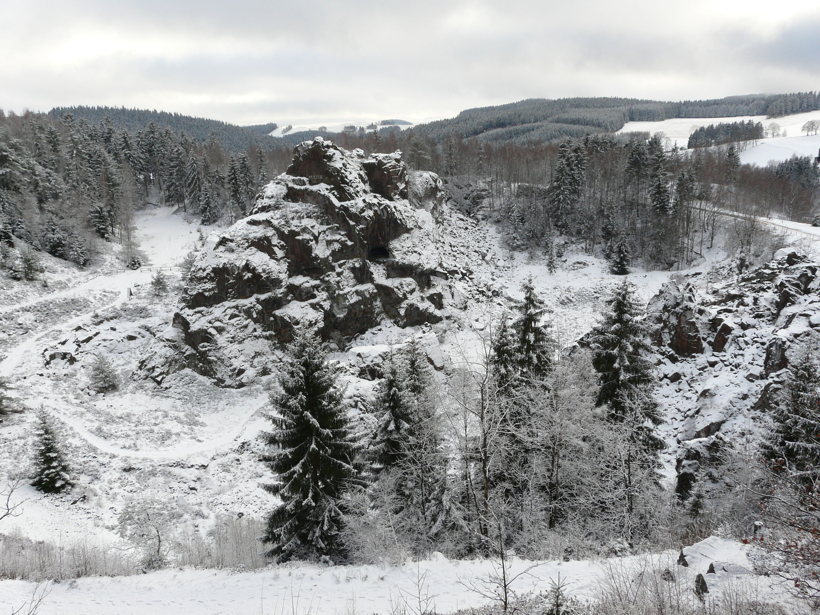 Die Binge in Geyer entstand zwischen 1700 und 1807 durch den Einsturz großer Hohlräume (Weitungen), die von den Bergleuten bei dem übermäßigen Abbau (Raubbau) von Zinnstein in den Geyersberg hineingearbeitet wurden. Die Weitungen waren zum Teil bis 40m hoch und hatten einen Durchmesser bis 35m. Heute hat die Binge einen Umfang von rund 750m und eine Tiefe von rund 50m.